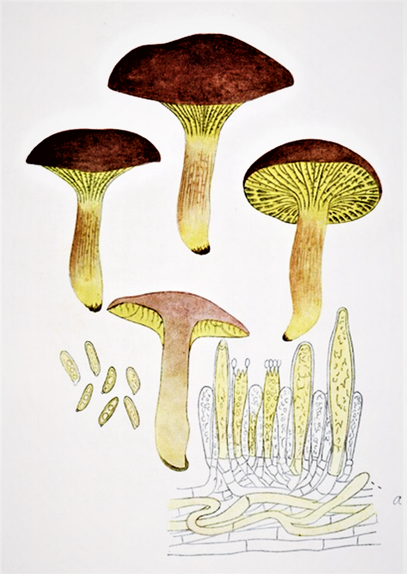 Giacomo Bresadola: Phylloporus rhodoxanthus (Schwein.) Bres. (1900) Syn. Phylloporus pelletieri (Lév.) Quél. (1888)